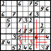 Sudoku